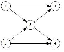 СФЦ системы с мостиковой структурой